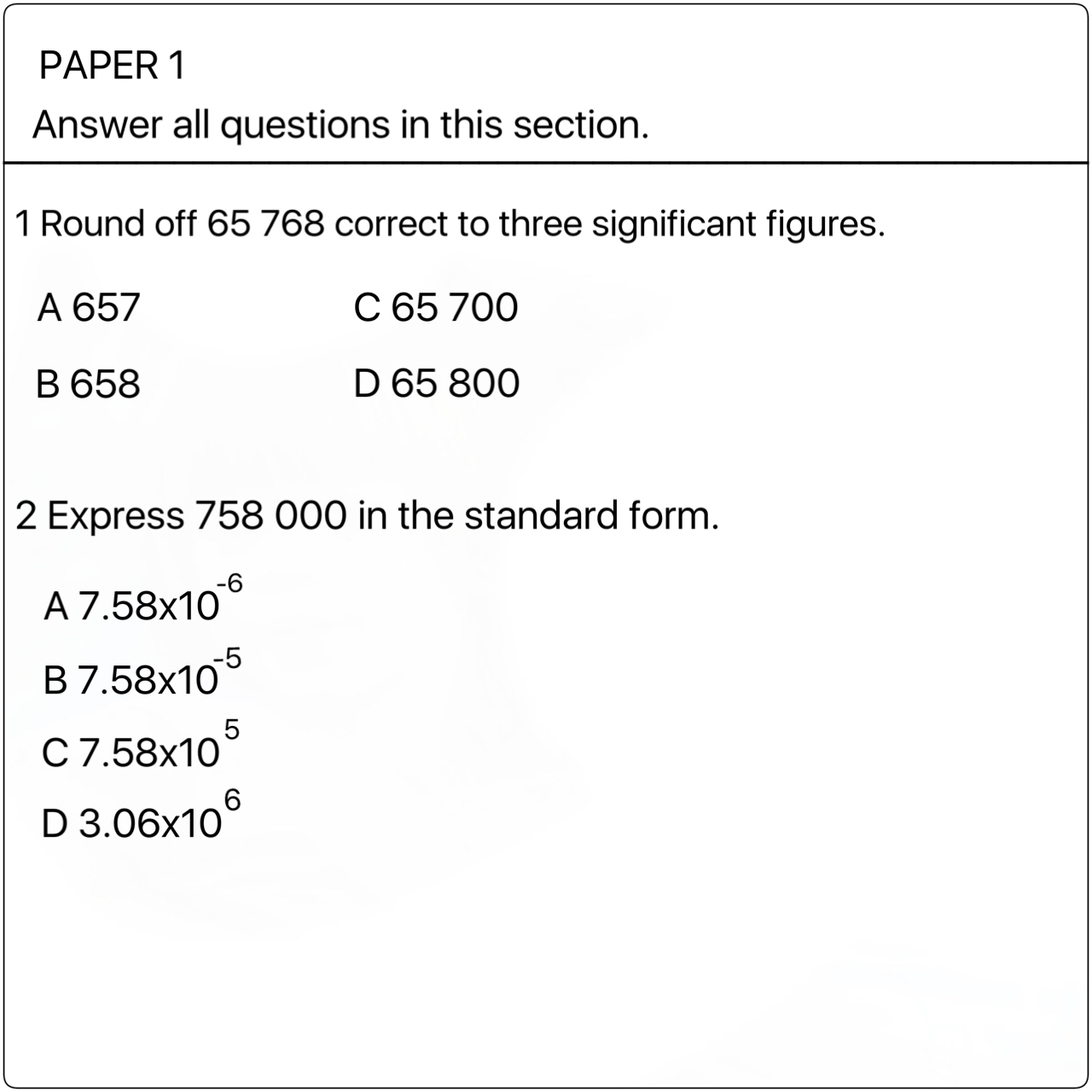 中文（中国大陆）: 数学题格式